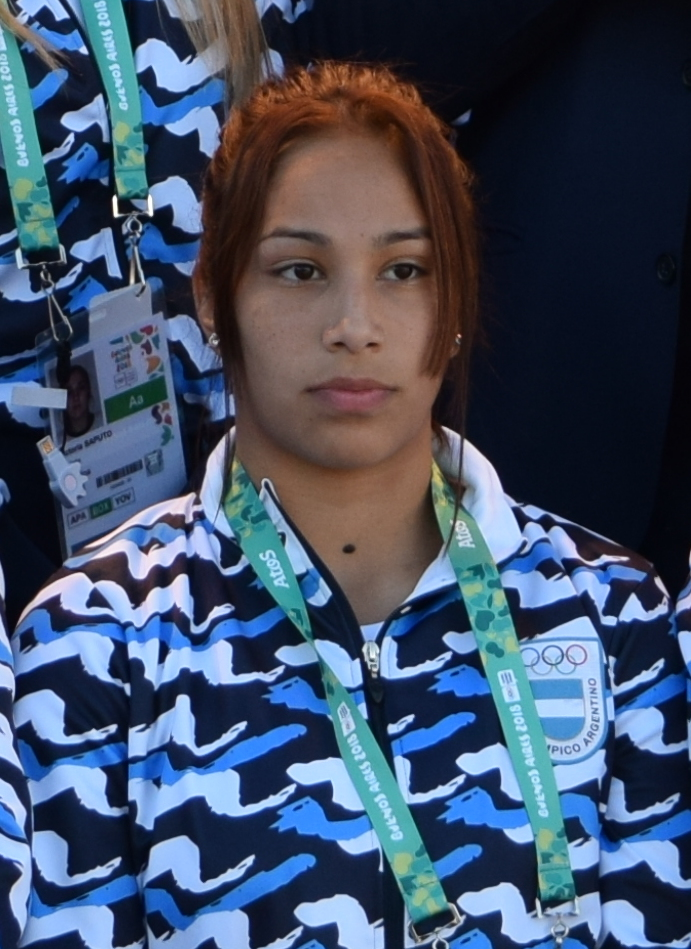 Bienvenida a la Delegación Argentina, en la Villa Olímpica por autoridades nacionales y locales.